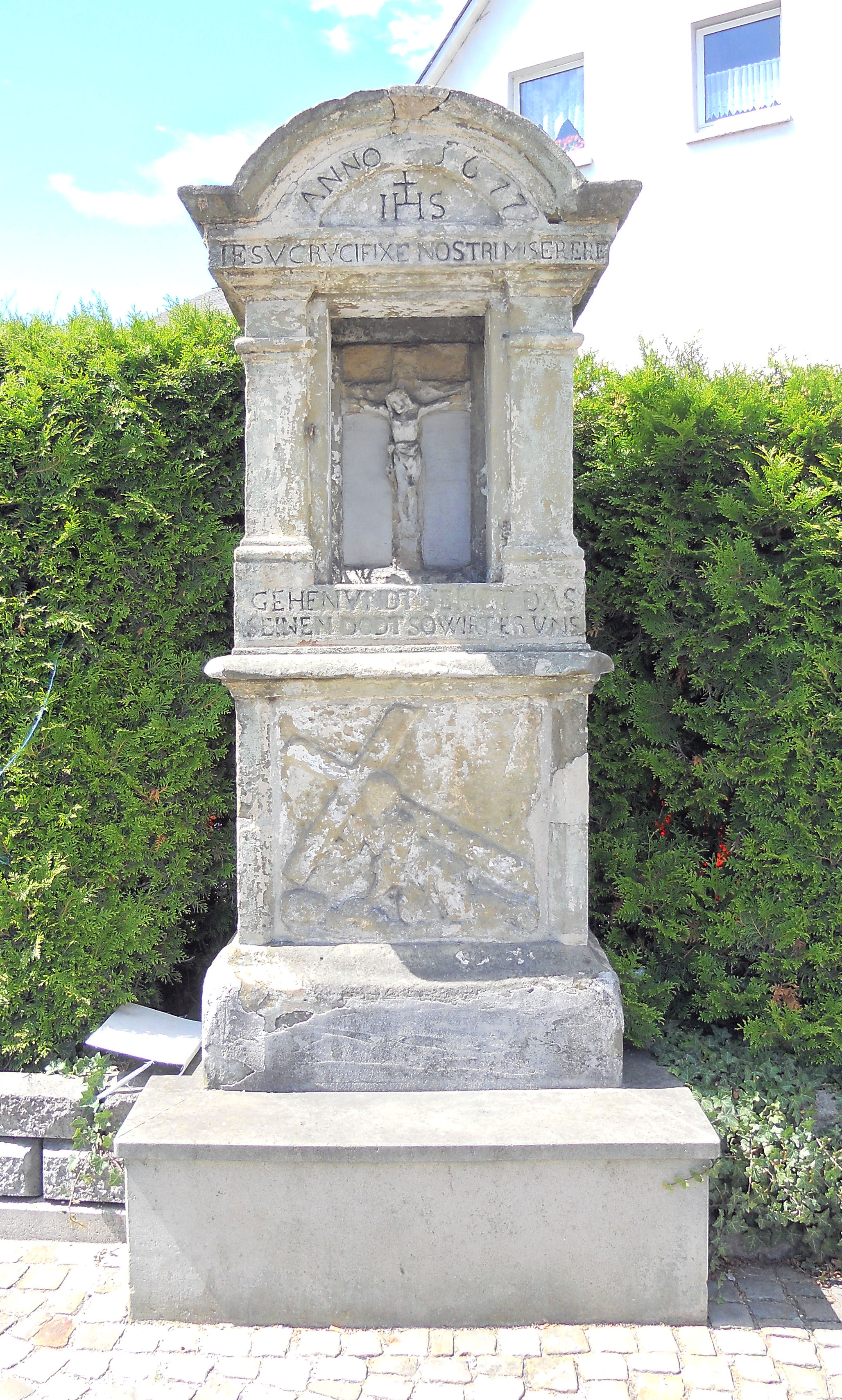 Heiligenhäuschen, gestiftet von Bürgermeister Johann Koch